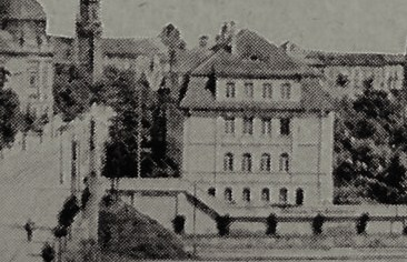 Niemiecki Bank Listów Zastawnych (potem: ZETO) - Poznan. Fragm. pocztóki sprzed I wojny świat.